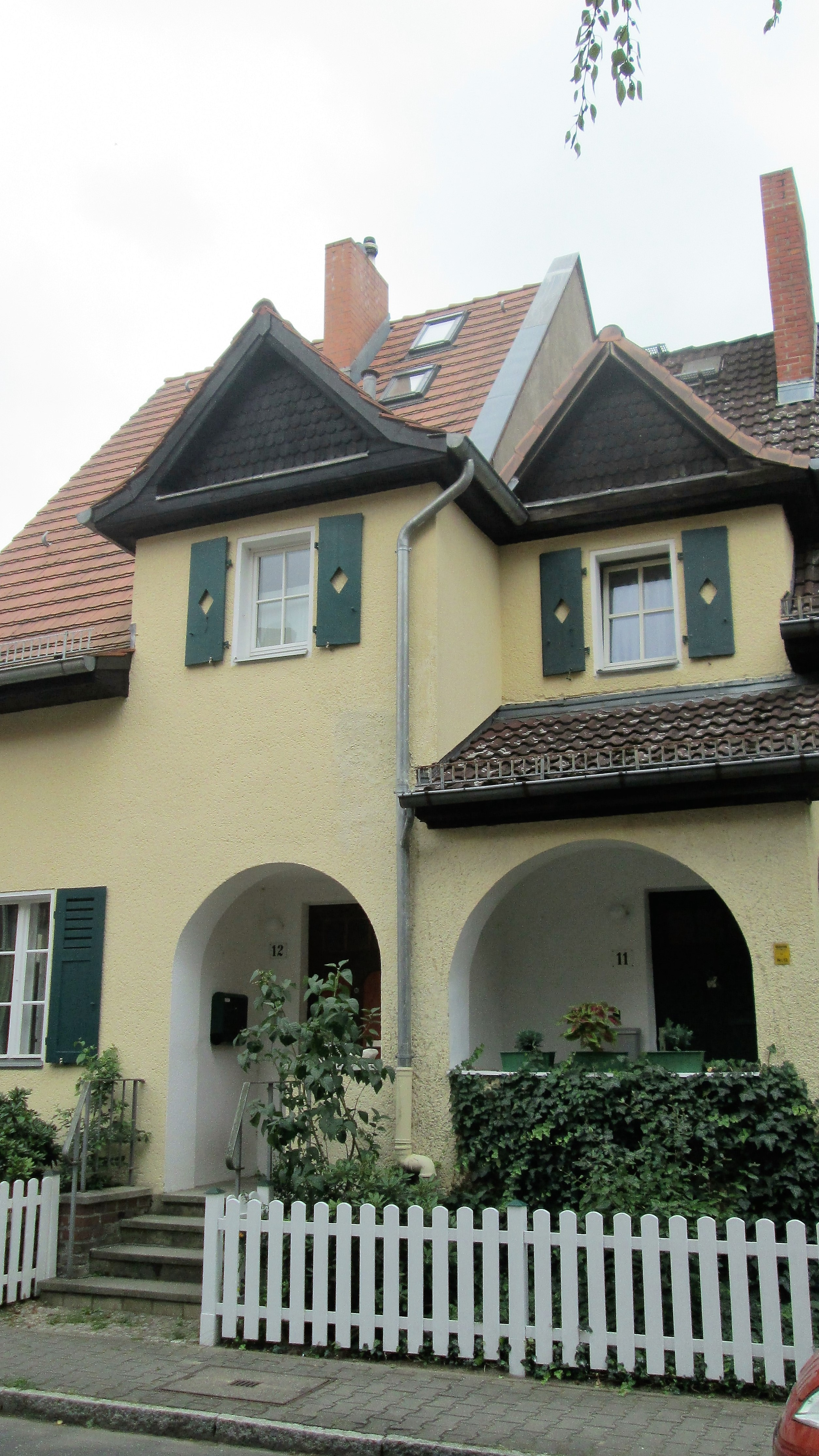 Aspenweg 11/12, Berlin-Hakenfelde (Waldsiedlung)